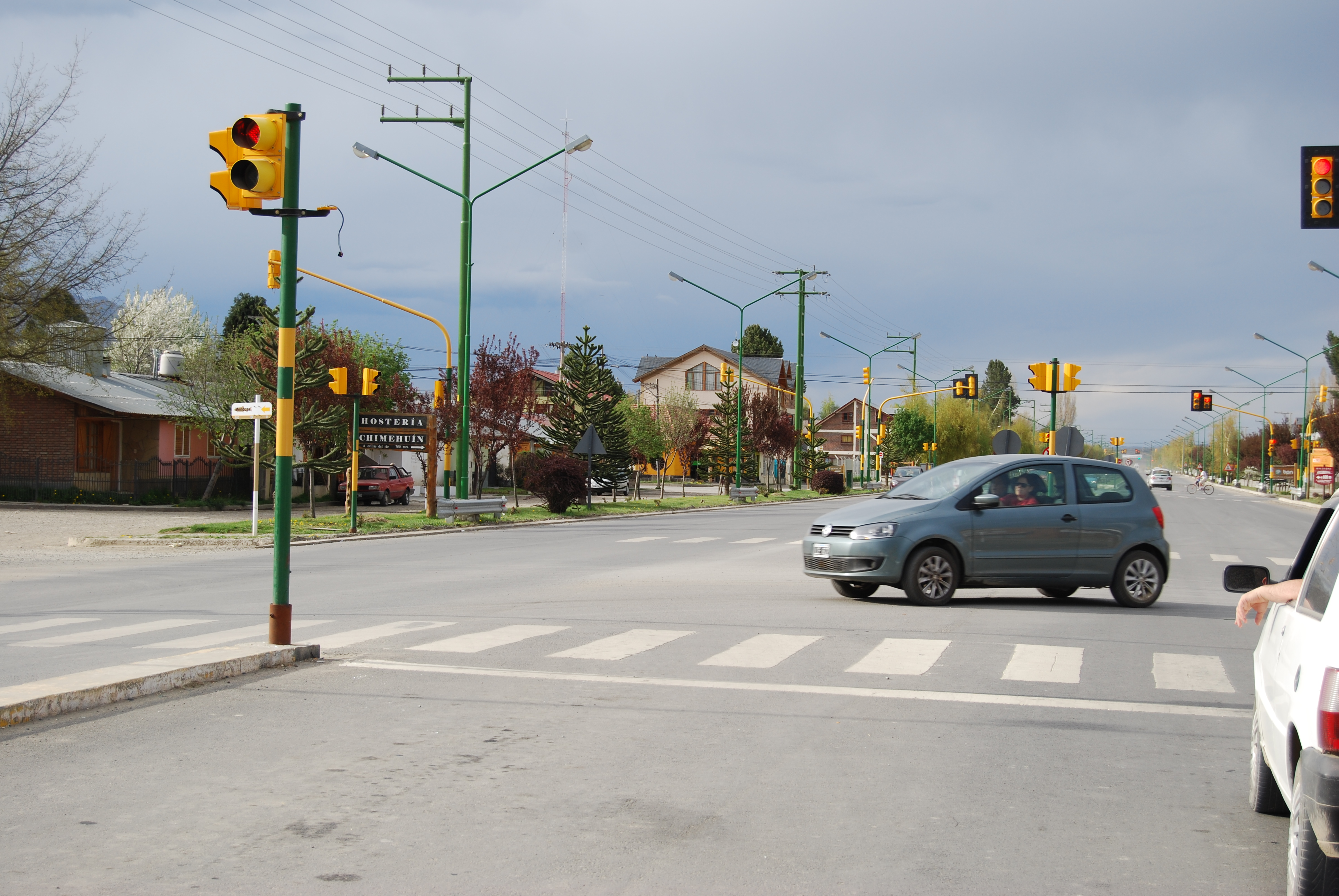 Junin de los Andes, bulevar principal sobre ruta que atraviesa la localidad.